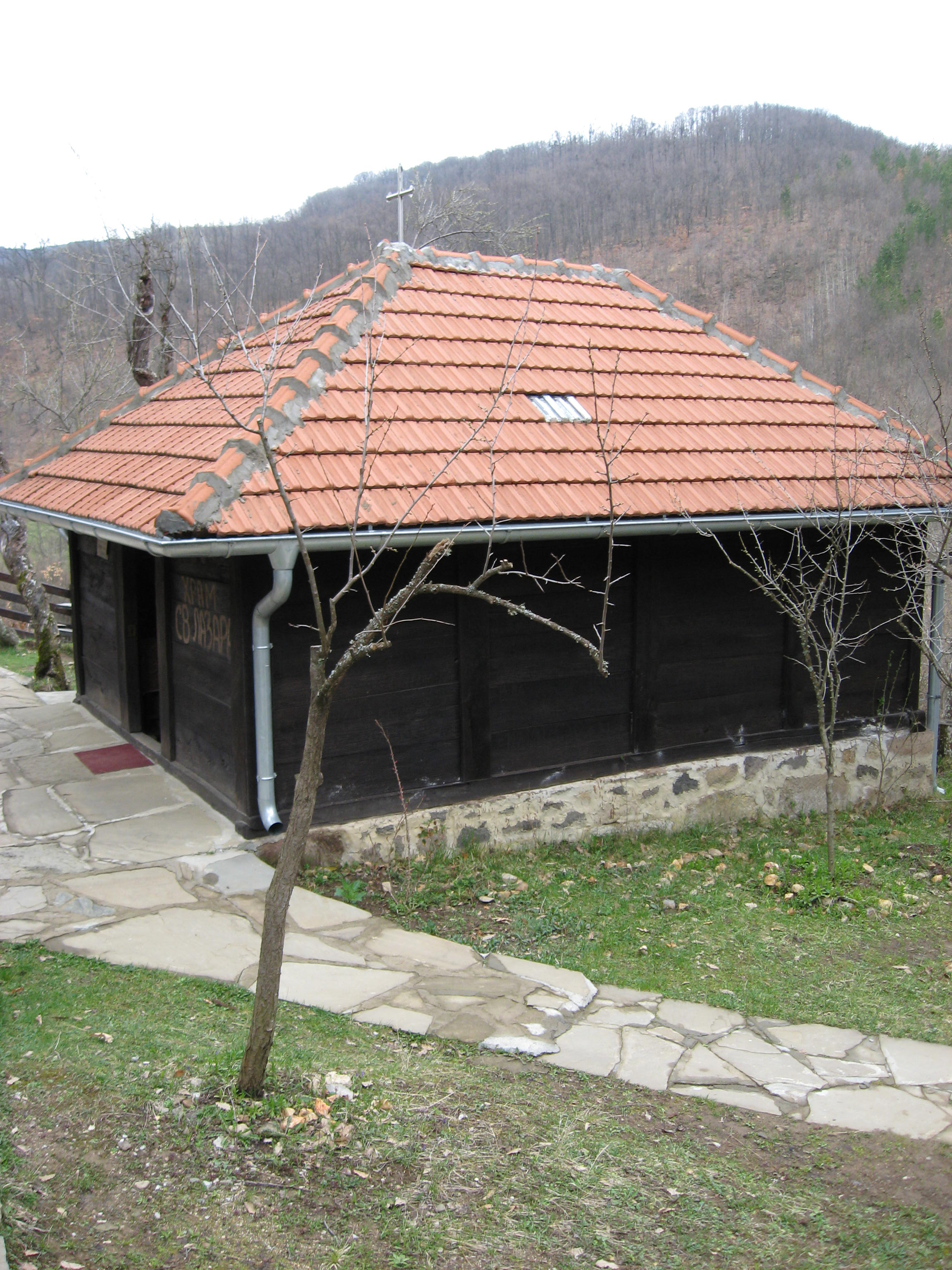 Church Lazarica, Prolom Spa, near Kuršumlija, Serbia/L'église Lazarica à proximité de Prolom Banja, près de Kuršumlija, Serbie